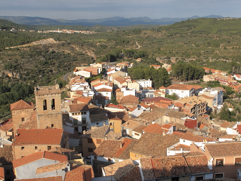 vista elevada de Bejís